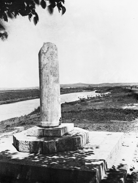 אנדרטת זכרון במקום בו חצה הצבא הבריטי את הגשר מעל ואדי עוג'ה - 1917.